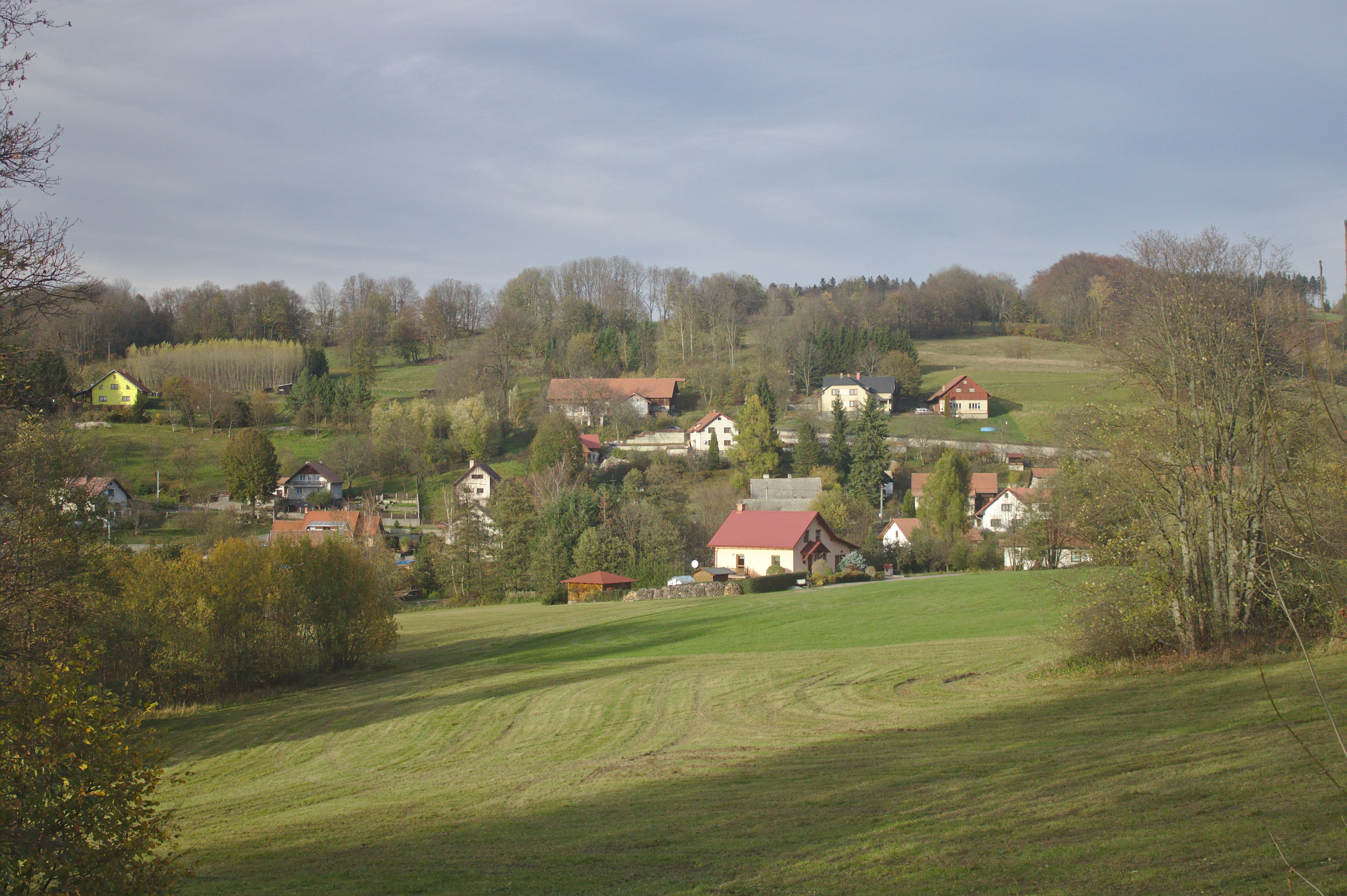 Domy ve vesnici Osečnice v Královéhradeckém kraji